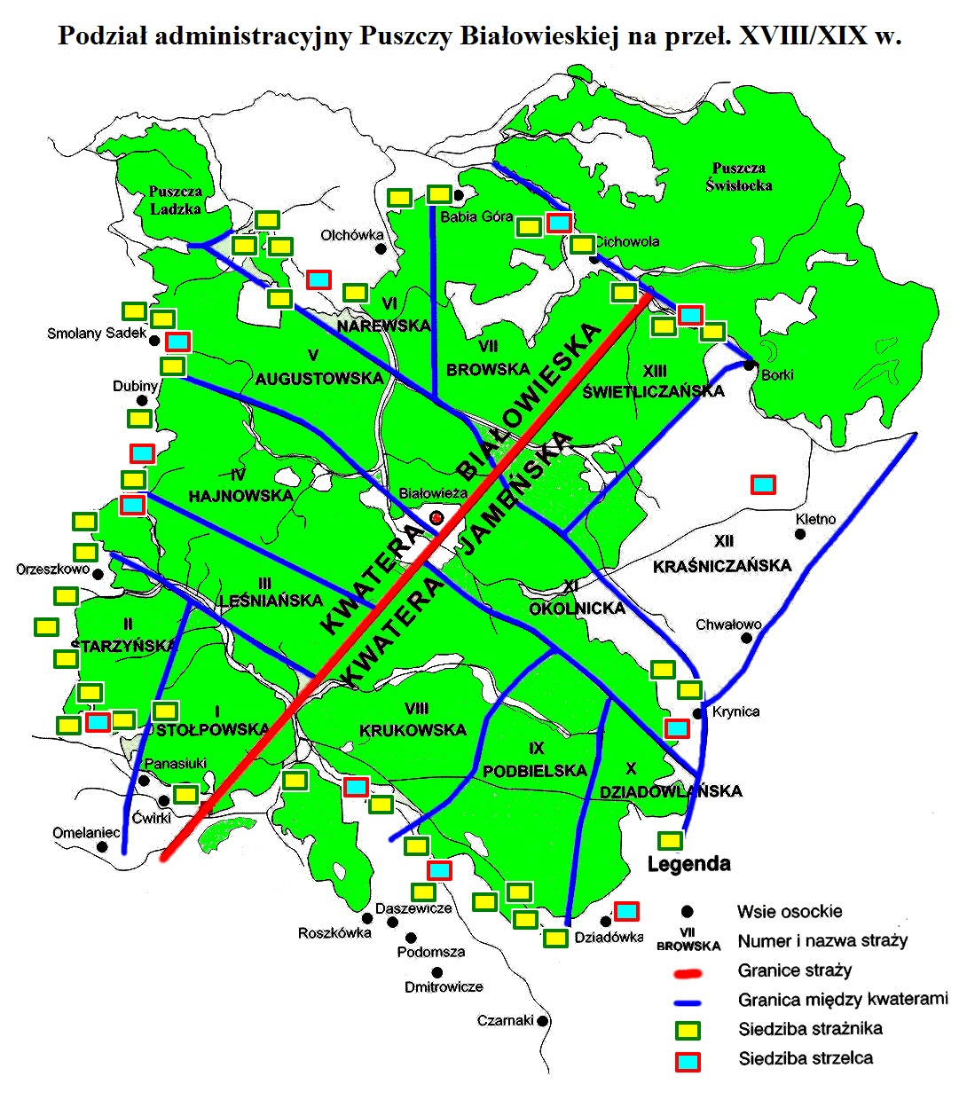 Administracja Puszczy Białowieskiej